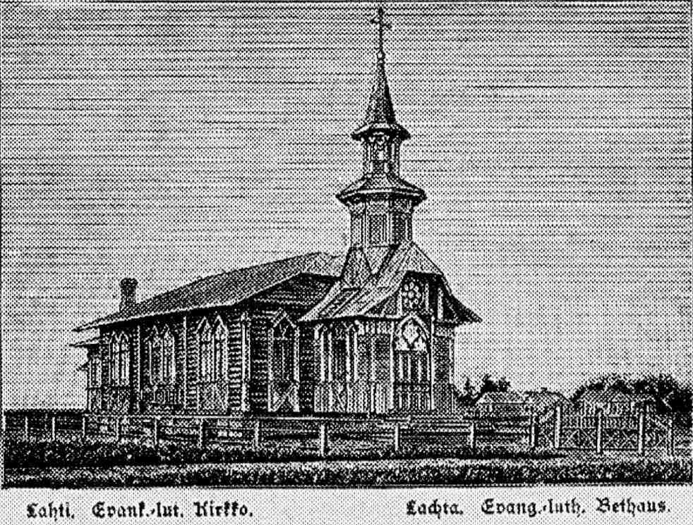 Кирха святой Марии в Лахте. Фотогравюра.